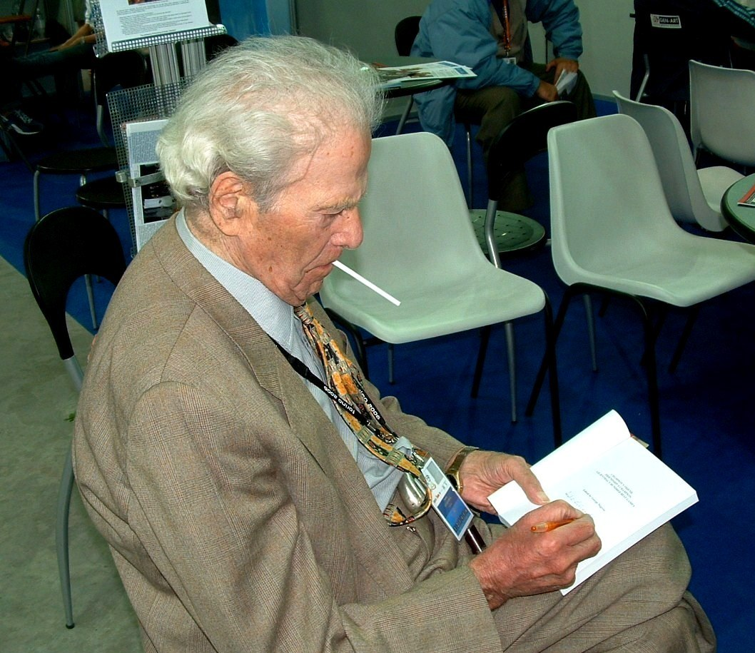 foto del Grande Maestro di scacchi Andor Lilienthal alle olimpiadi di Torino 2006.